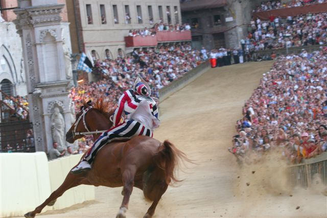 Un momento della Prova in Piazza del Campo